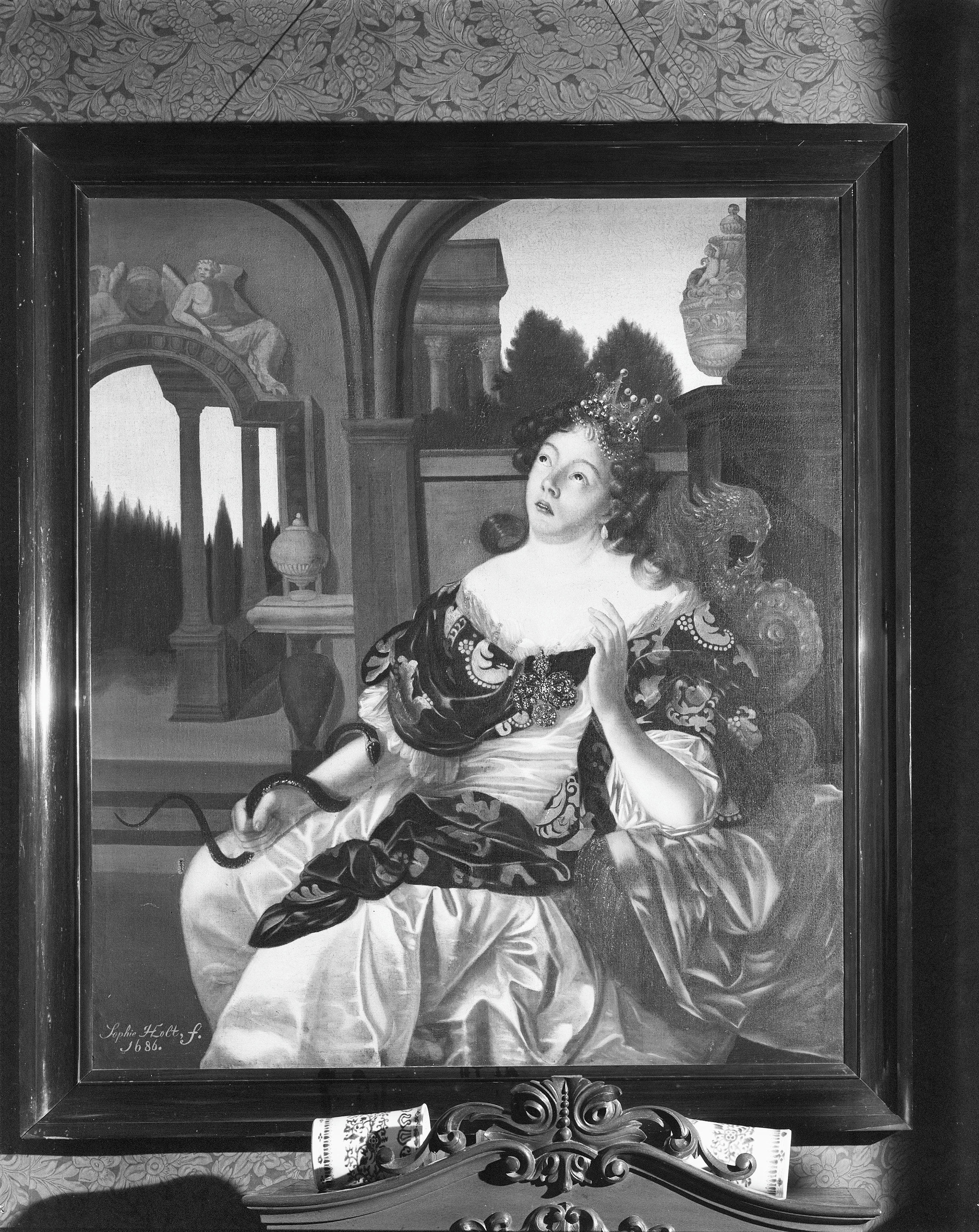 Vrouwenhuis: schilderij Zelfmoord van Cleopatra This tag does not indicate the copyright status of the attached work. A normal copyright tag is still required. See Commons:Licensing.